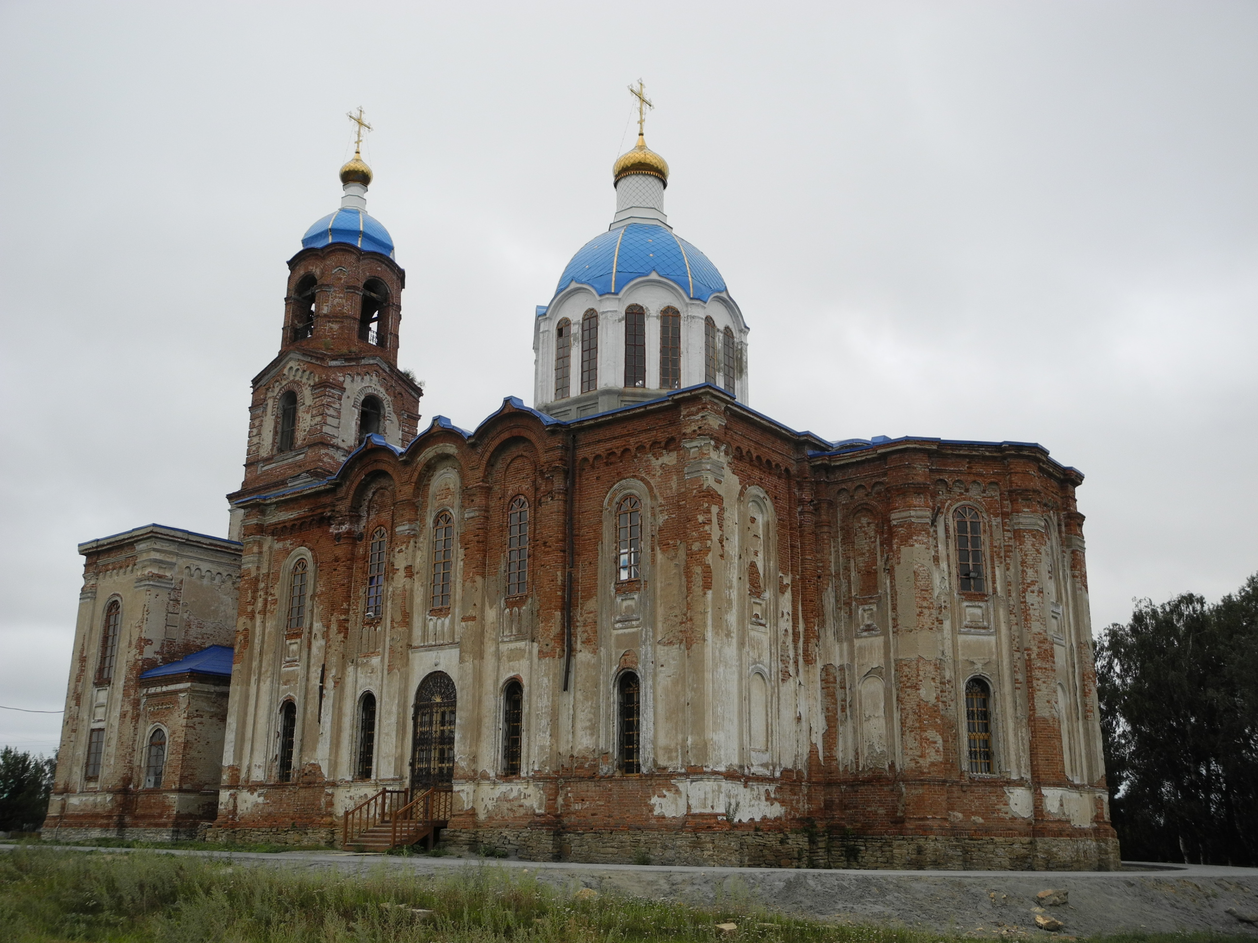 Собор Дмитриевский (Челябинская область, Кыштым, село Губернское)